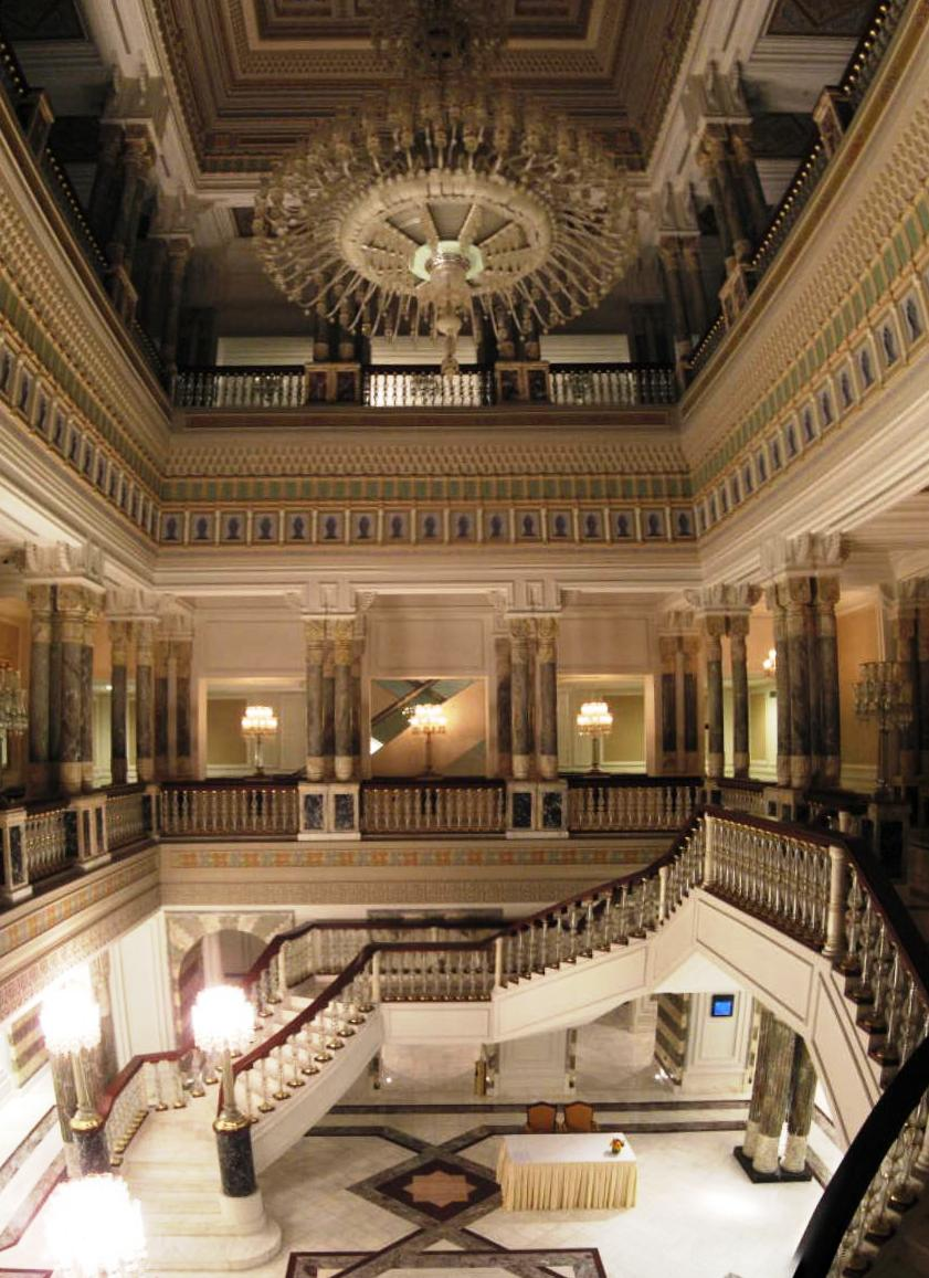 Çırağan Palace